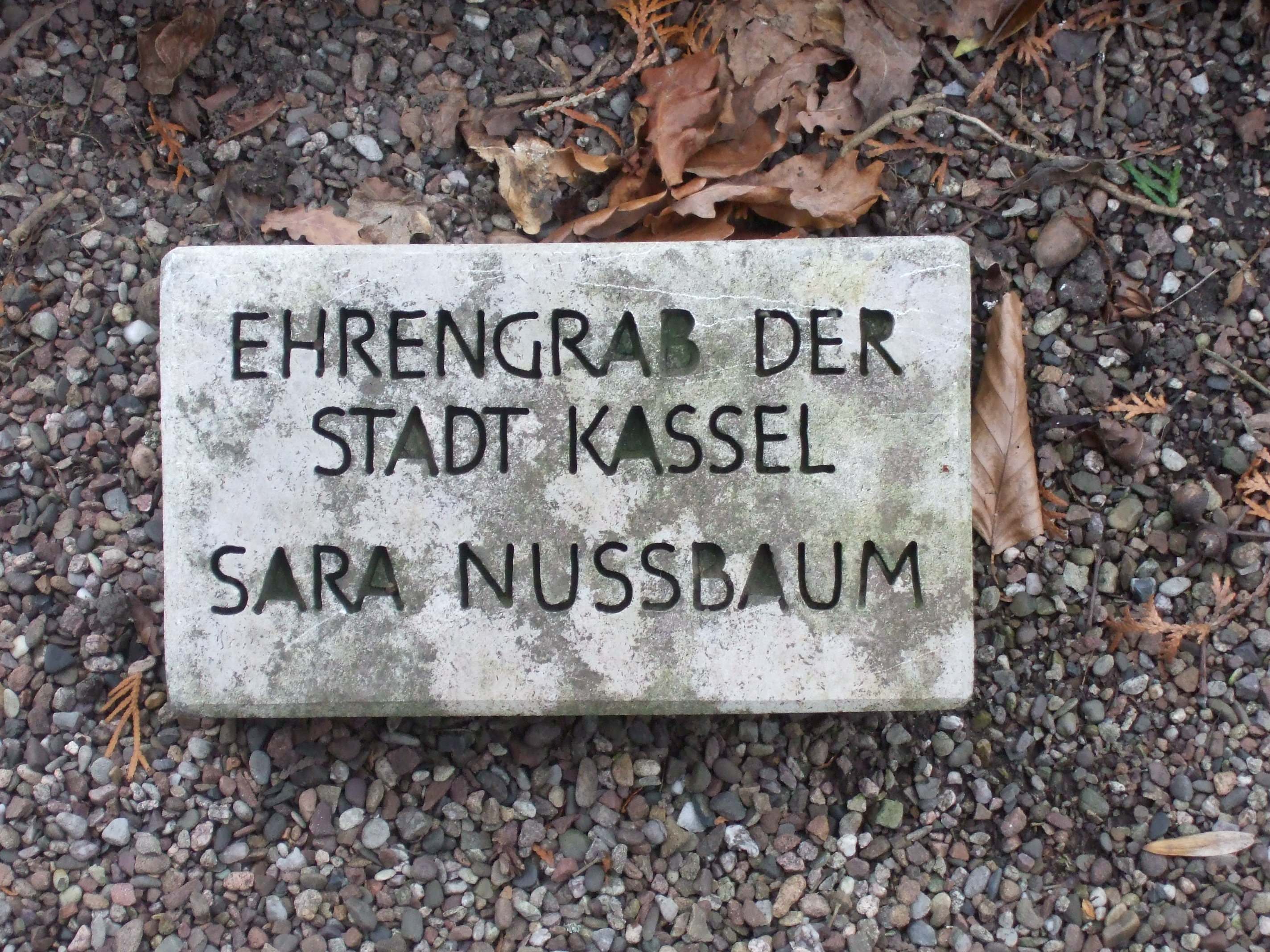 Steintafel eines Ehrengrabes der Stadt Kassel